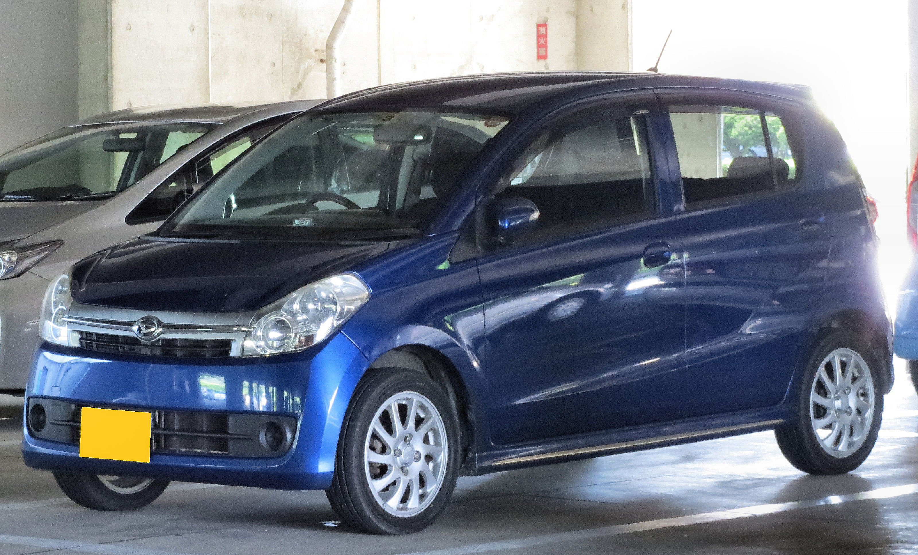 ダイハツ ミラカスタム RS